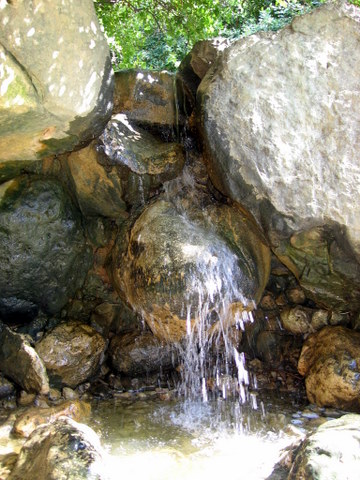 govta stream, נחל גובתה